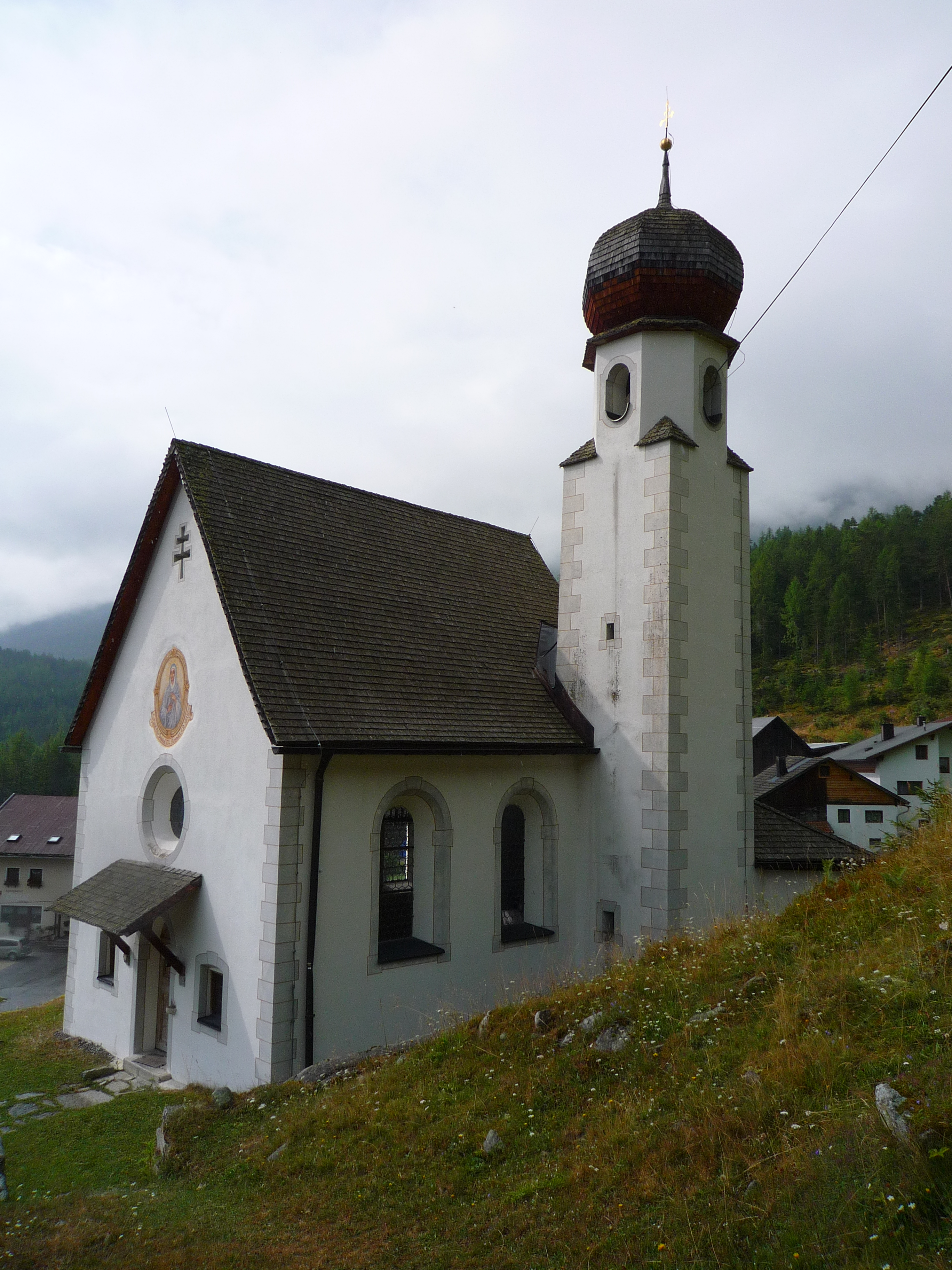 Schmerzhaften Mutter Gottes Kirche à Köfels (Tyrol, Autriche)